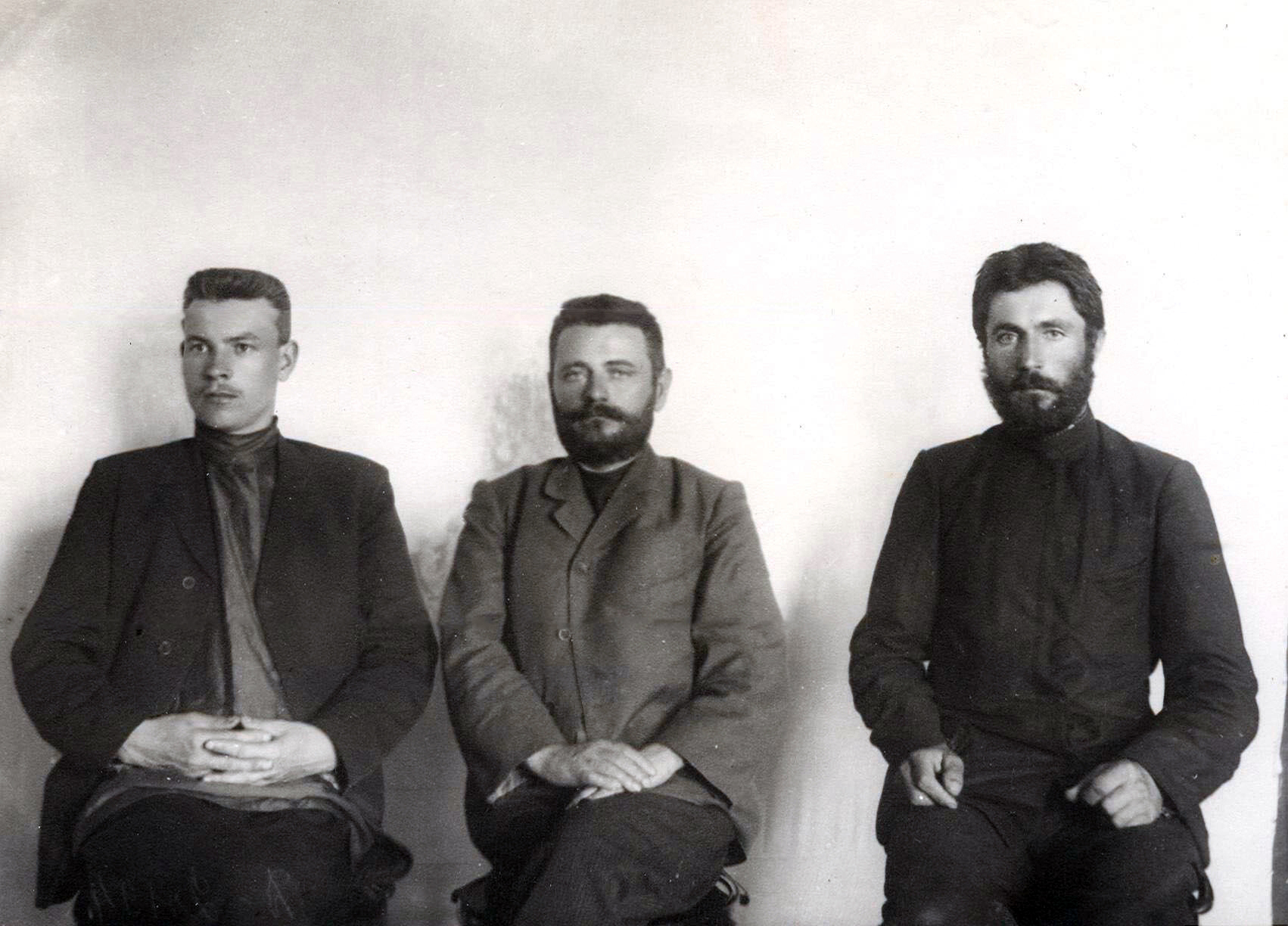 Депутаты I Государственной Думы Российской империи: А.И. Смирнов Б.И. Черников И. Е. Соломка